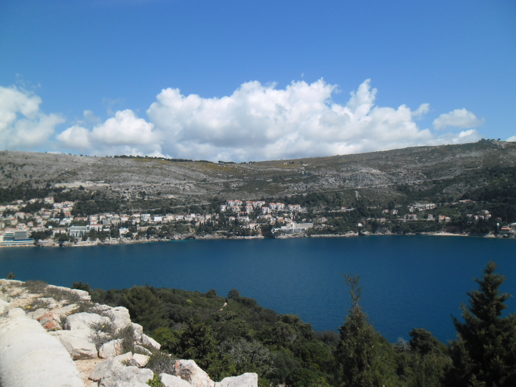 pogled s lokrumske utvrde Fort Royal